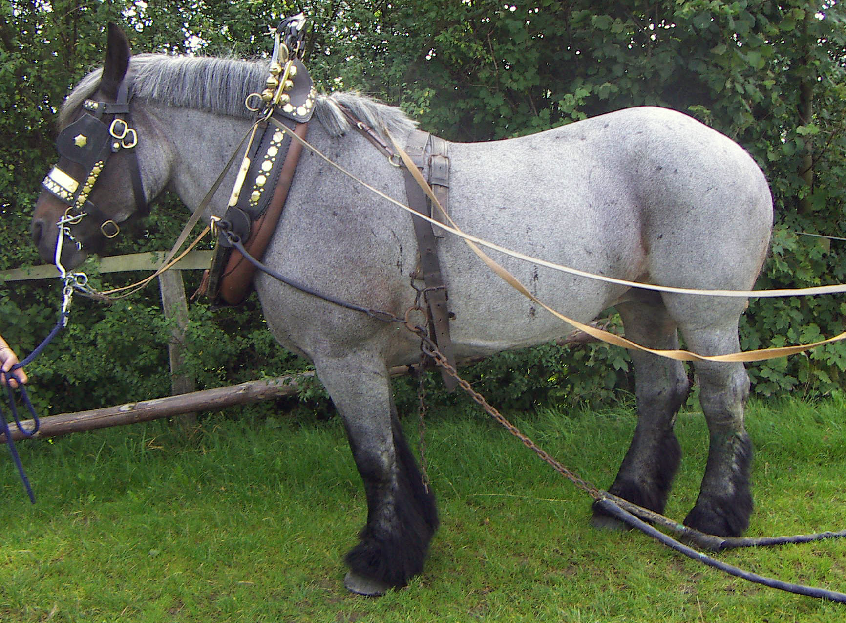 Brabanter oder Belgisches Kaltblut, Gezäumt als Rückepferd